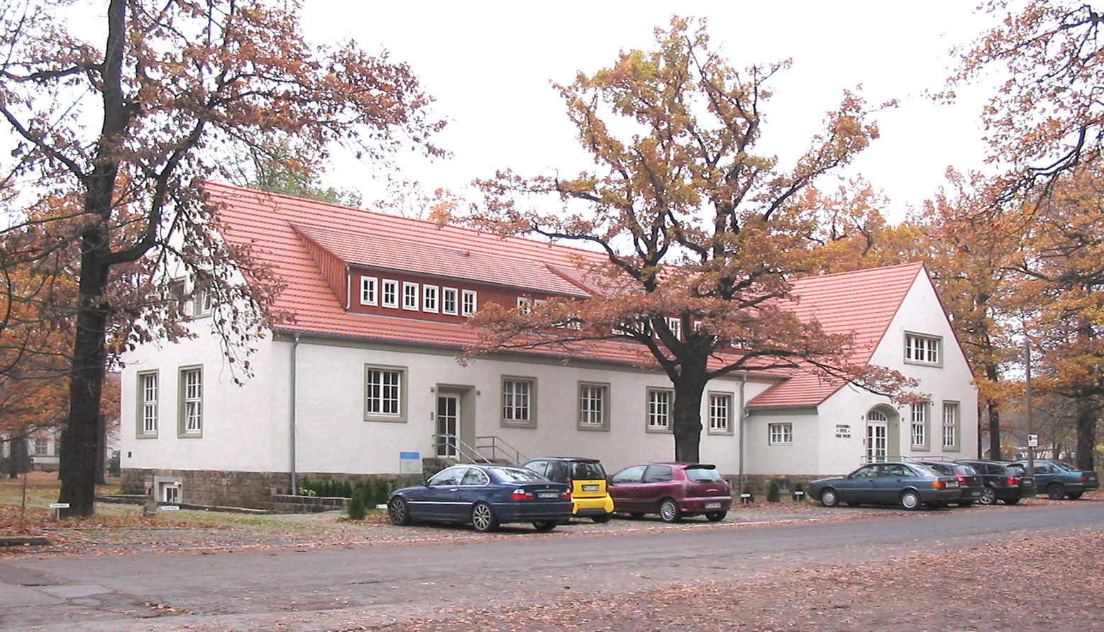 Radebeul, Chemische Fabrik v. Heyden, Ausbildungsstätte „Freie Jugend“, Forststraße 22, 2008